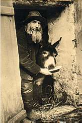 Frédéric Gérard dit "Le père Frédé" et son âne Lolo, dit "Boronali" (anagramme d'Aliboron] devant le Lapin Agile à Montmartre, XVIIIe arrondissement, Paris, France.